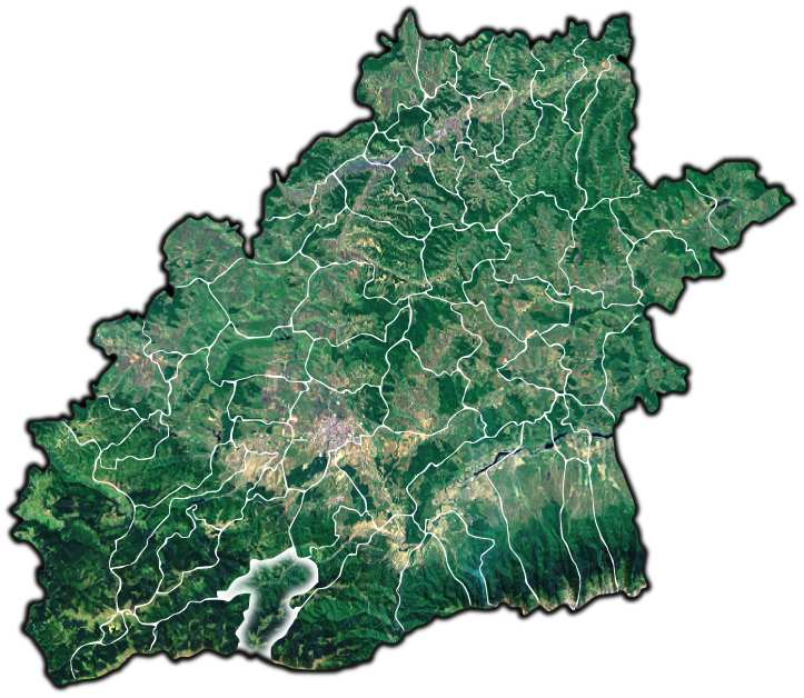 Rau Sadului jud Sibiu.